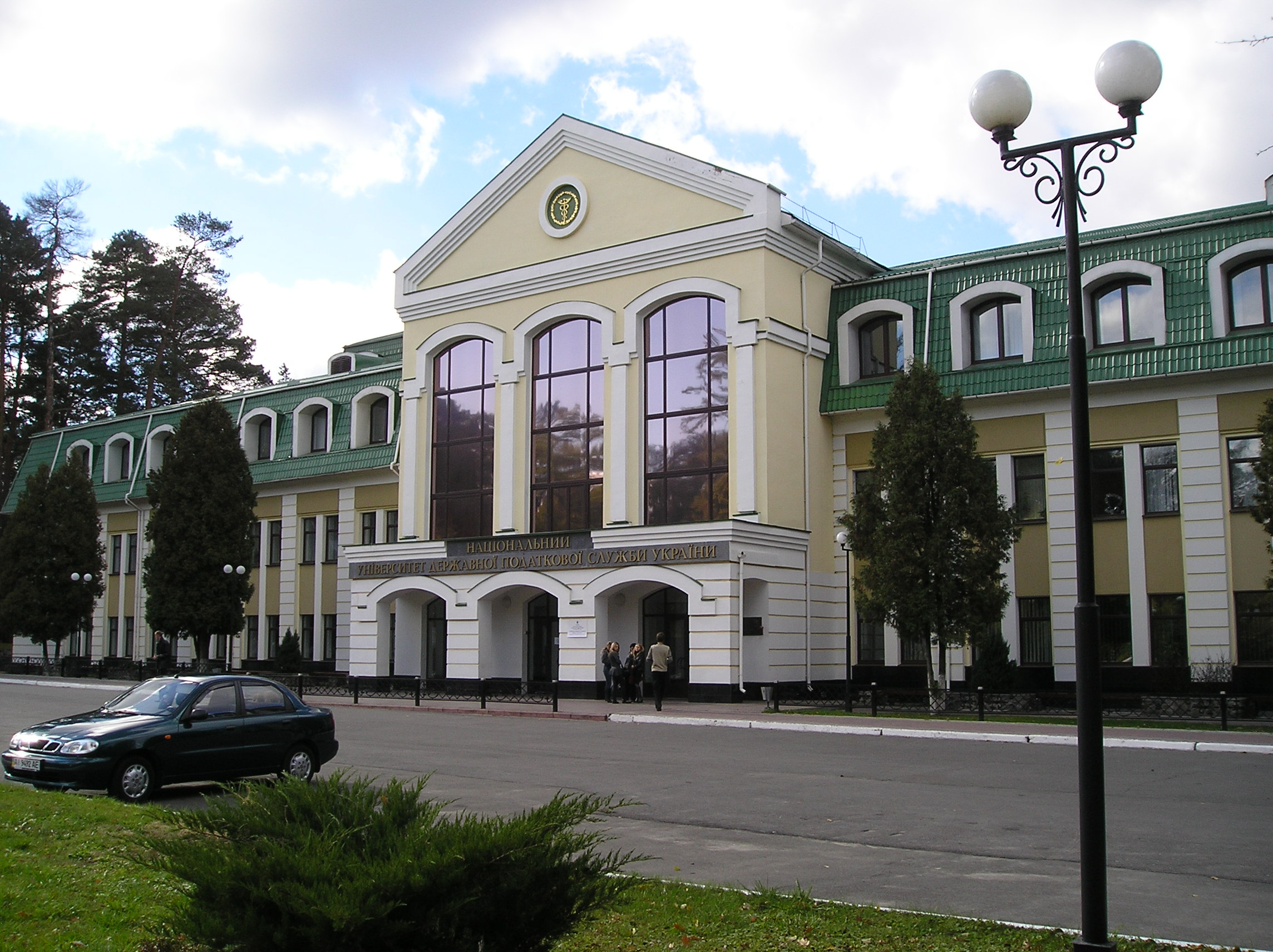 Nationalen Universität des staatlichen Steuerdienst der Ukraine, Irpin, Ukraine